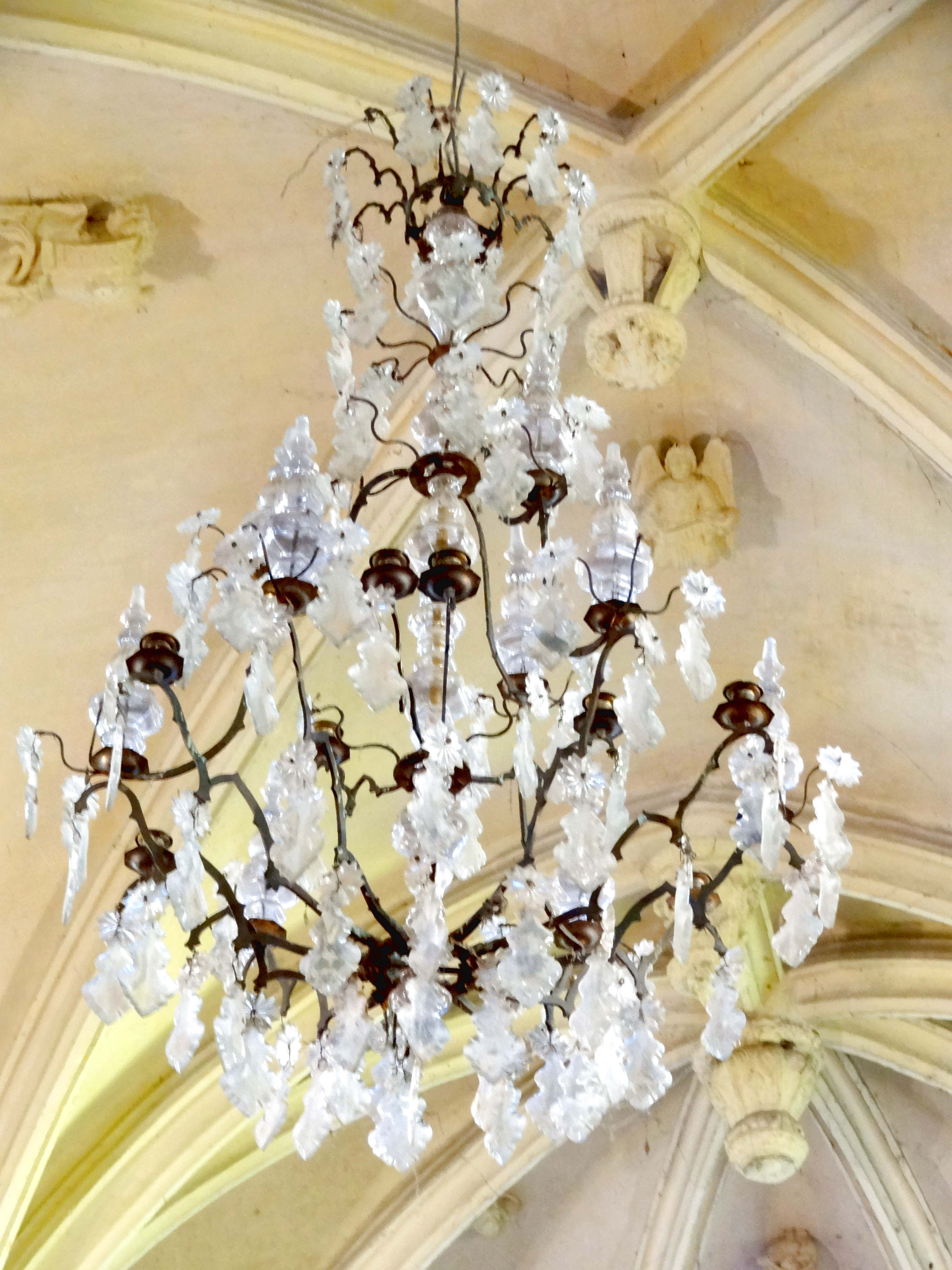 Mobilier de l'église - voir titre.